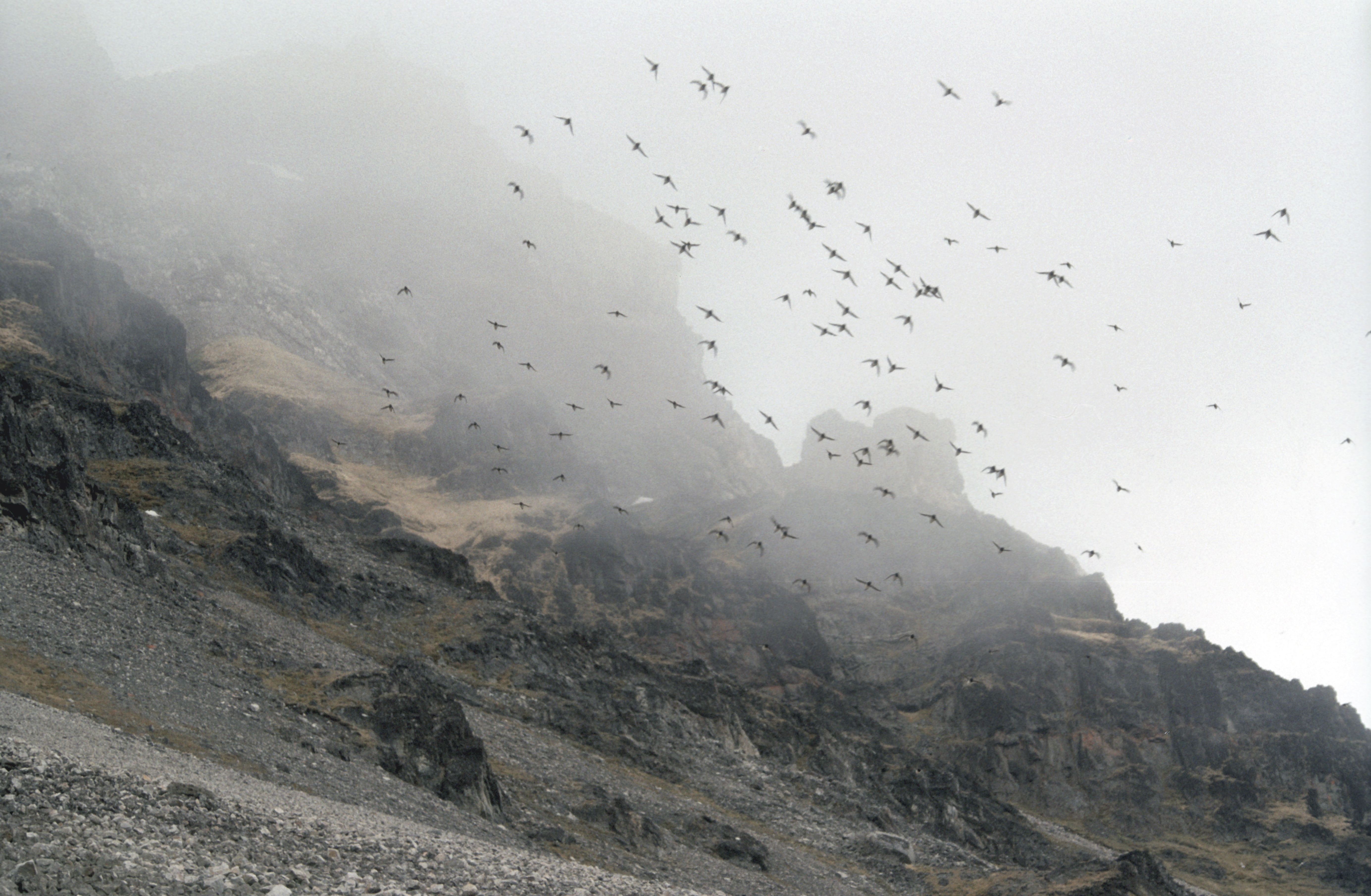 spitsbergen, Little Auk